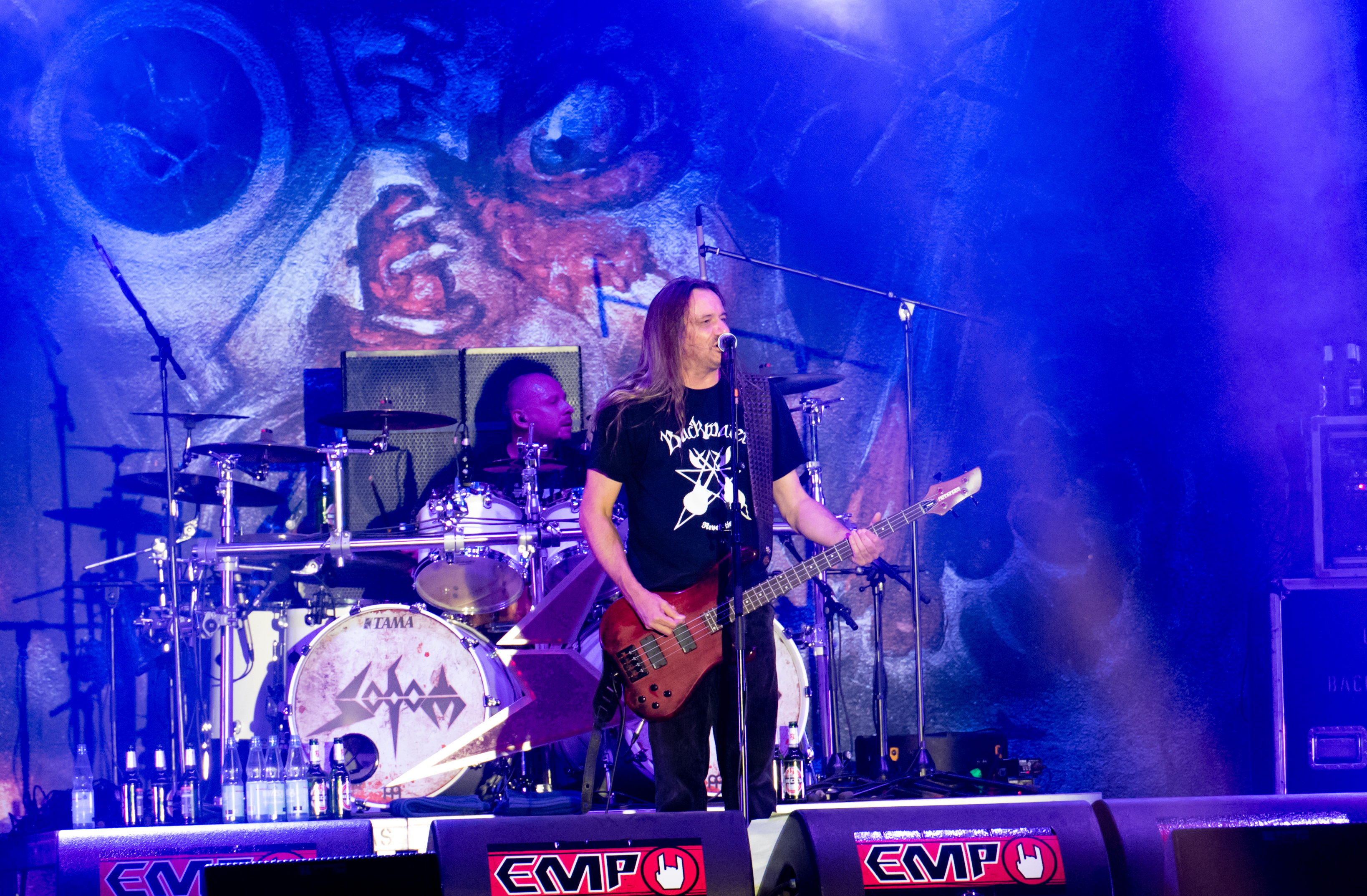 Sodom auf dem Reload Festival 2016